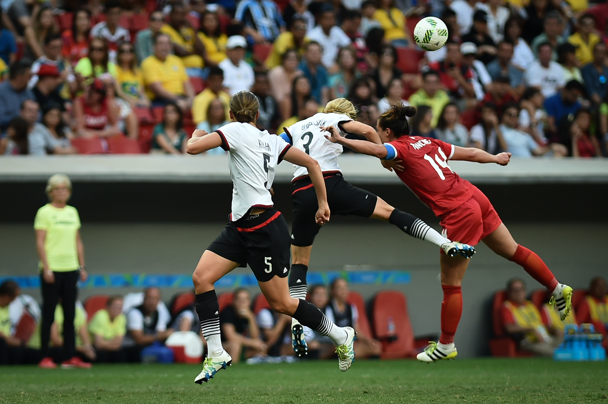 Estádio Nacional de Brasília Mané Garrincha, Brasília, DF, Brasil, 9/8/2016 Foto: Andre Borges/Agência Brasília Alemanha e Canadá jogam nesta terça-feira (9), no Estádio Mané Garrincha, pelo grupo F do futebol feminino nas Olimpíadas 2016.